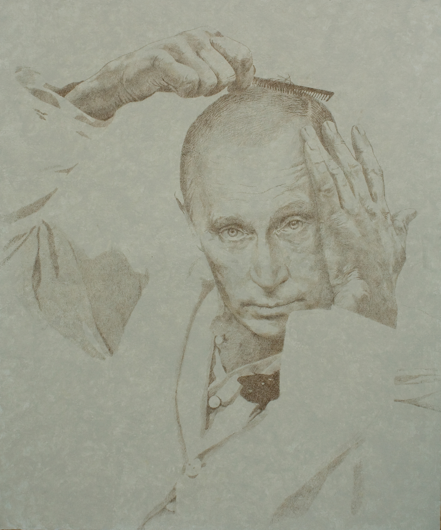 В. Колесников. Cremaster Valve. Холст, масло, масл. пастель, 120Х100, 2014